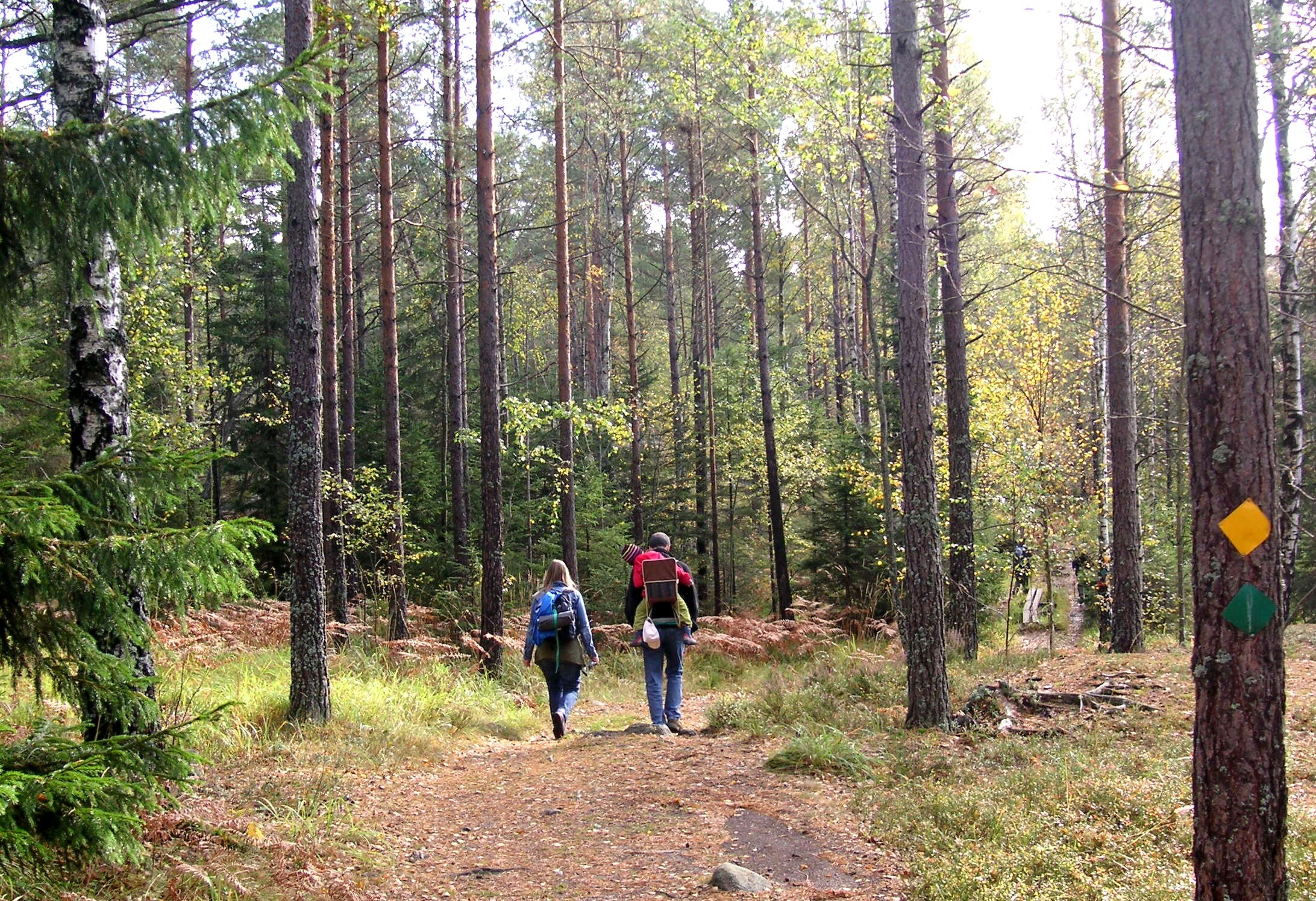 Rekreation i skogen, Paradisets naturreservat, Huddinge